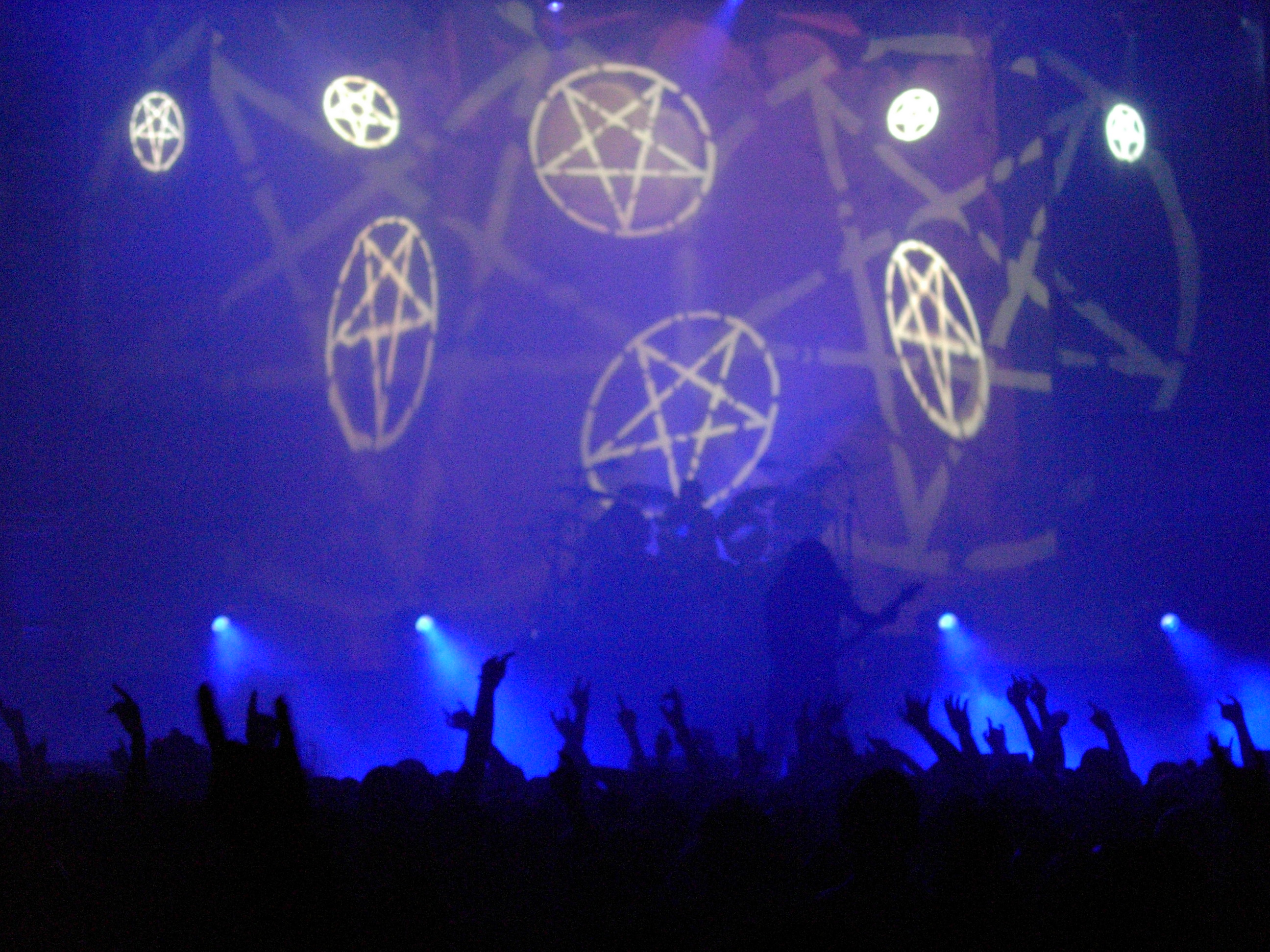 Slayer live; im Hintergrund Pentagramme